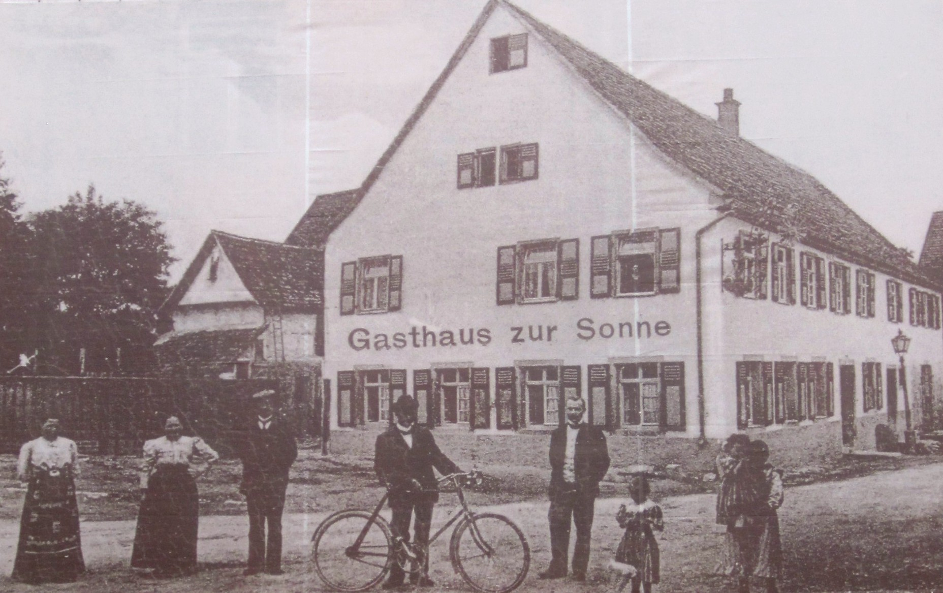 Gasthaus Sonne in Löchgau